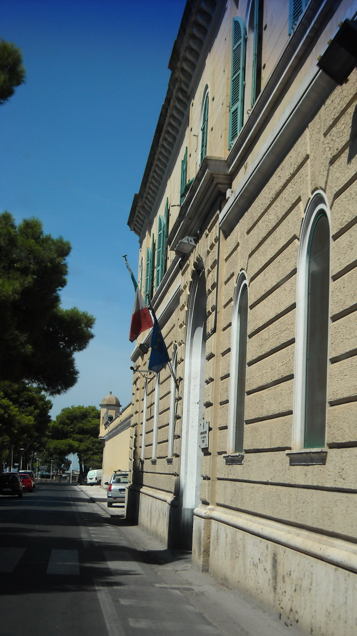 Ingresso ex carcere di Buoncammino, Cagliari